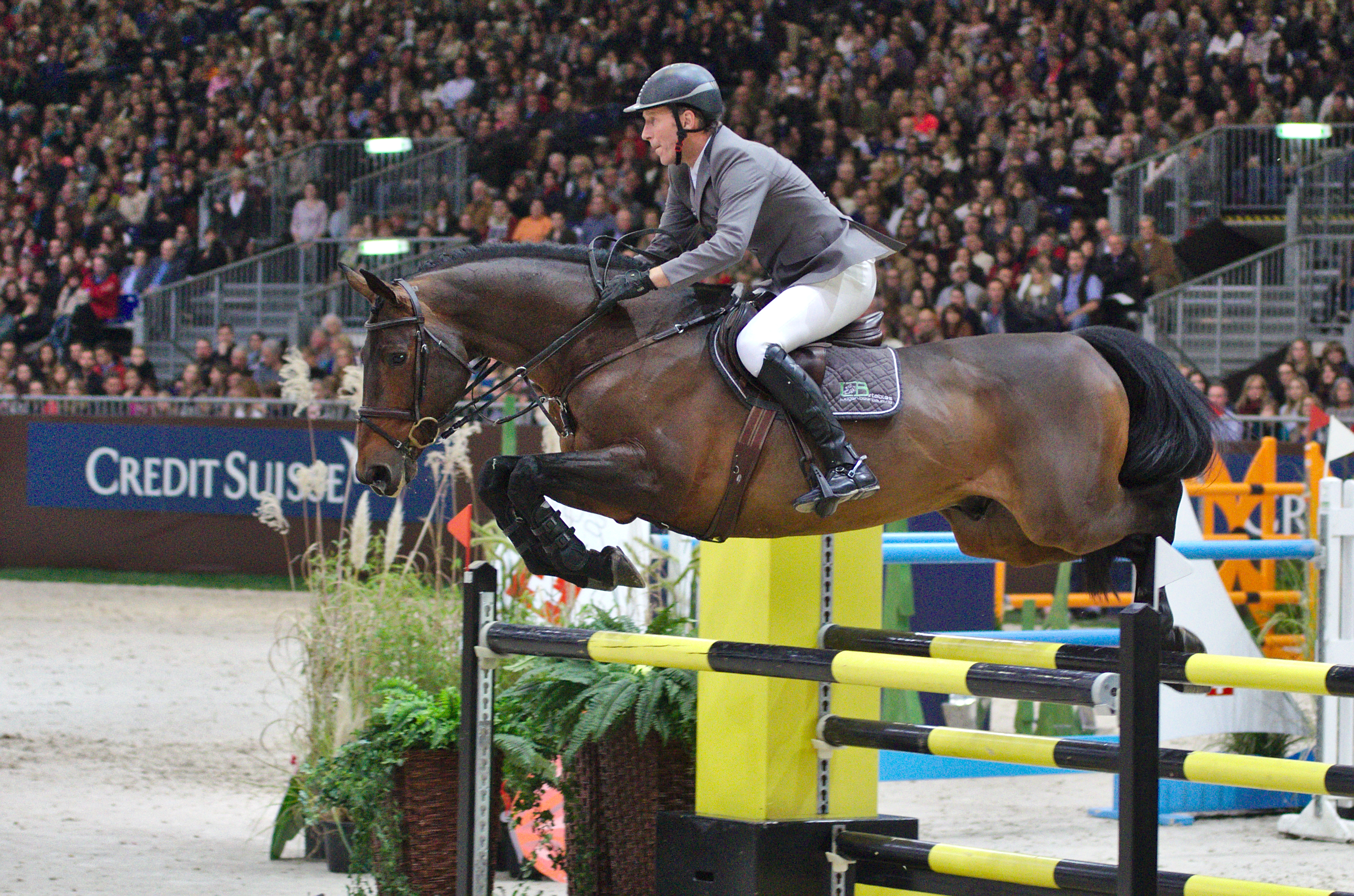 54eme CHI de Genève - 20141213 - Prix Credit Suisse - Ludger Beerbaum et Chaman